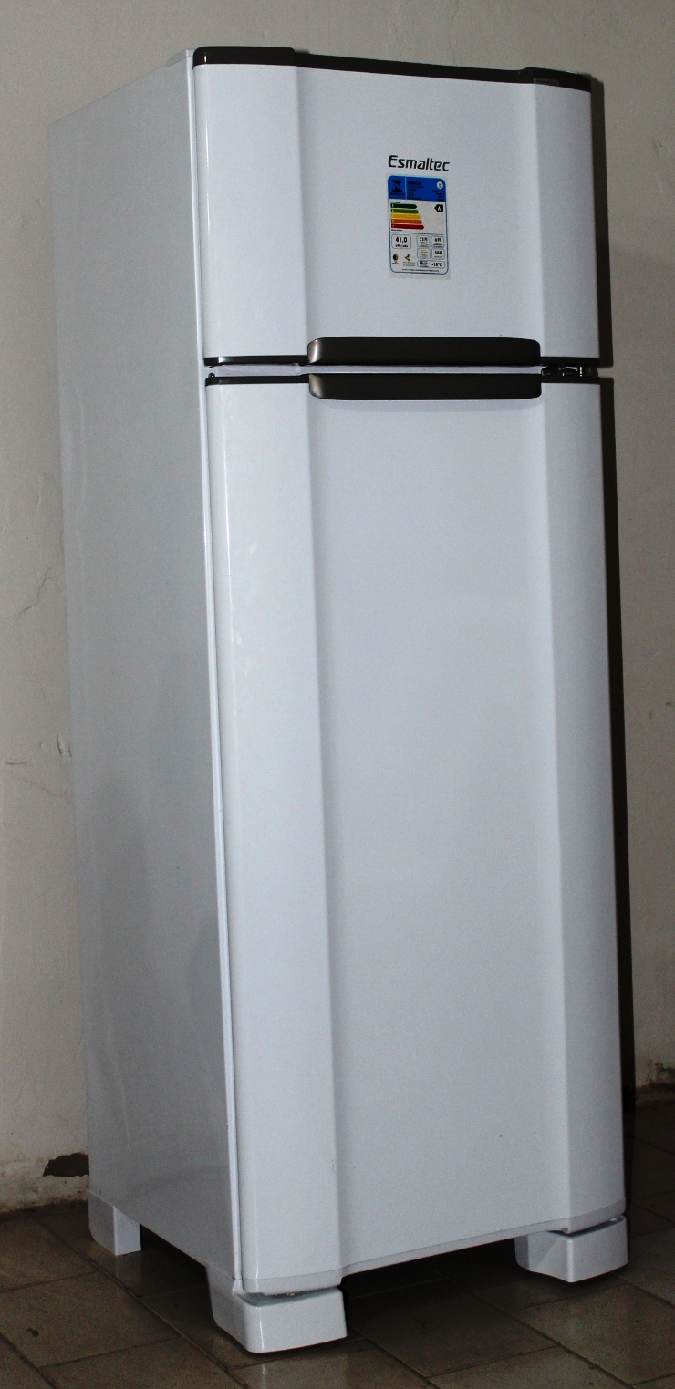 Geladeira da ESMALTEC num órgão cultural.